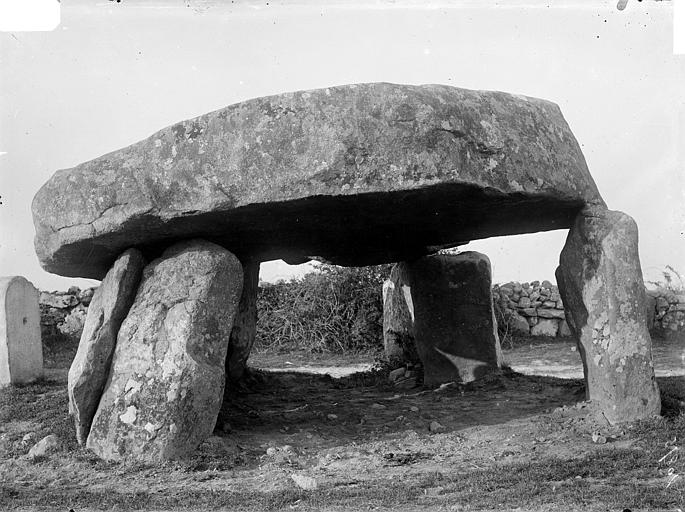 Dolmen de Gohquer à Plouharnel, photographié par Zacharie Le Rouzic.